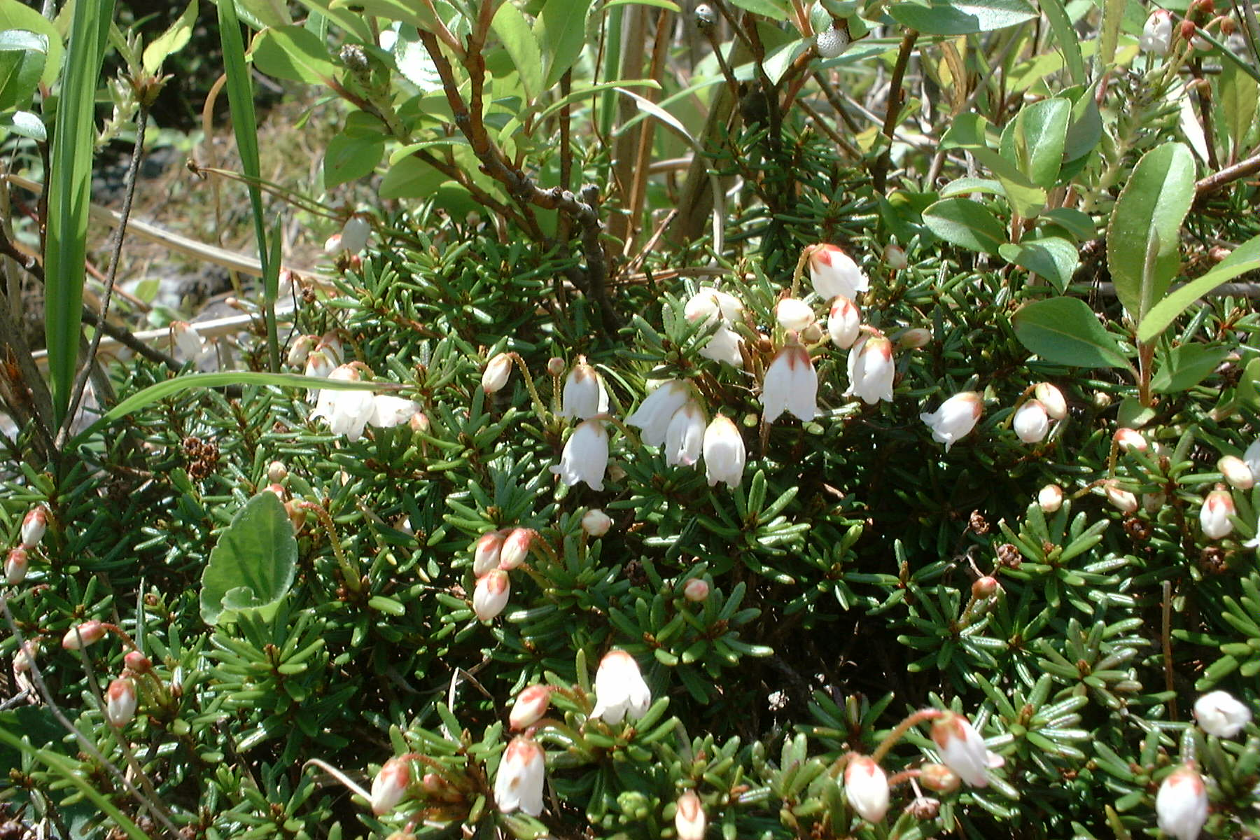 銅山峰のツガザクラ